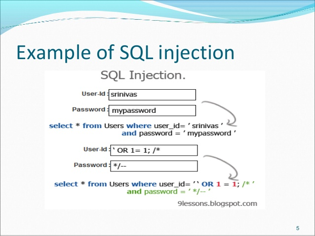 Монгол: SQL injection